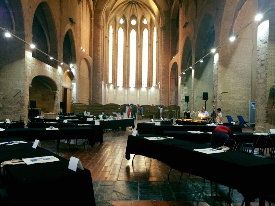 Montage du salon du livre du FILAF en cours